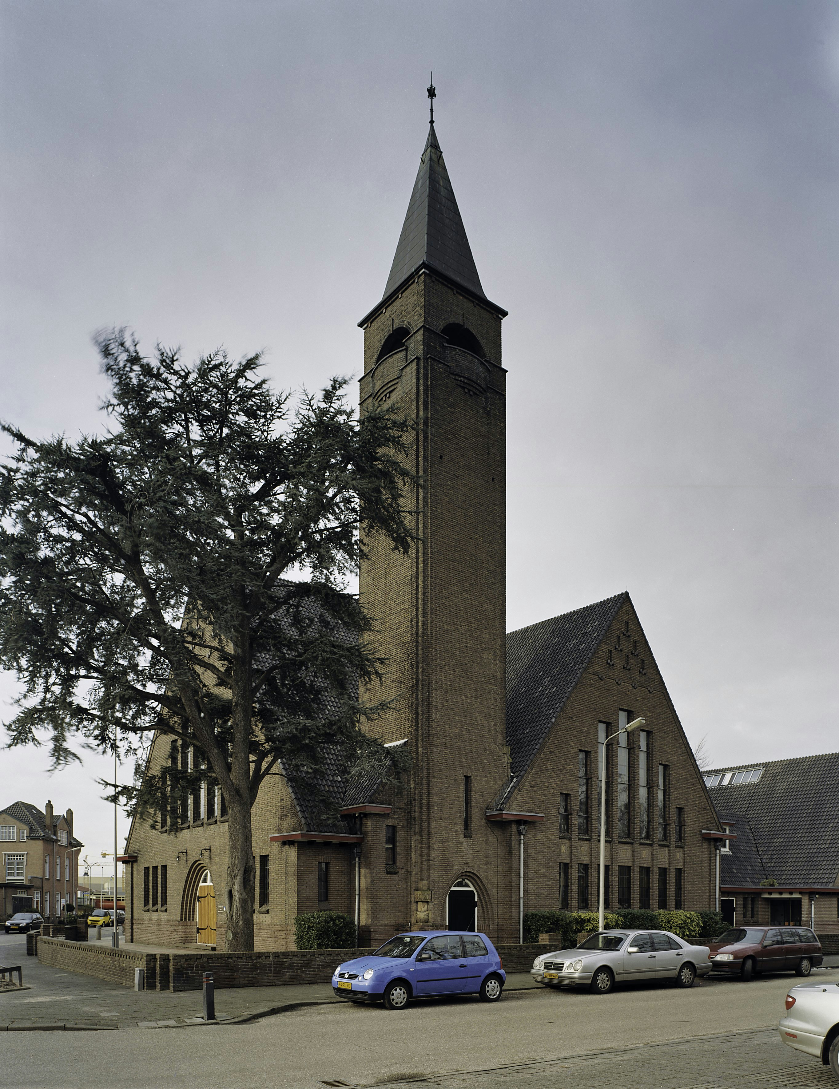 Gereformeerde Kerk: Overzicht toren (opmerking: Gefotografeerd voor Monumenten In Nederland Zuid-Holland)